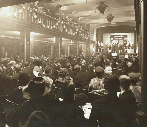 Dovrehallen, interiør, publikum, scene, galleri.